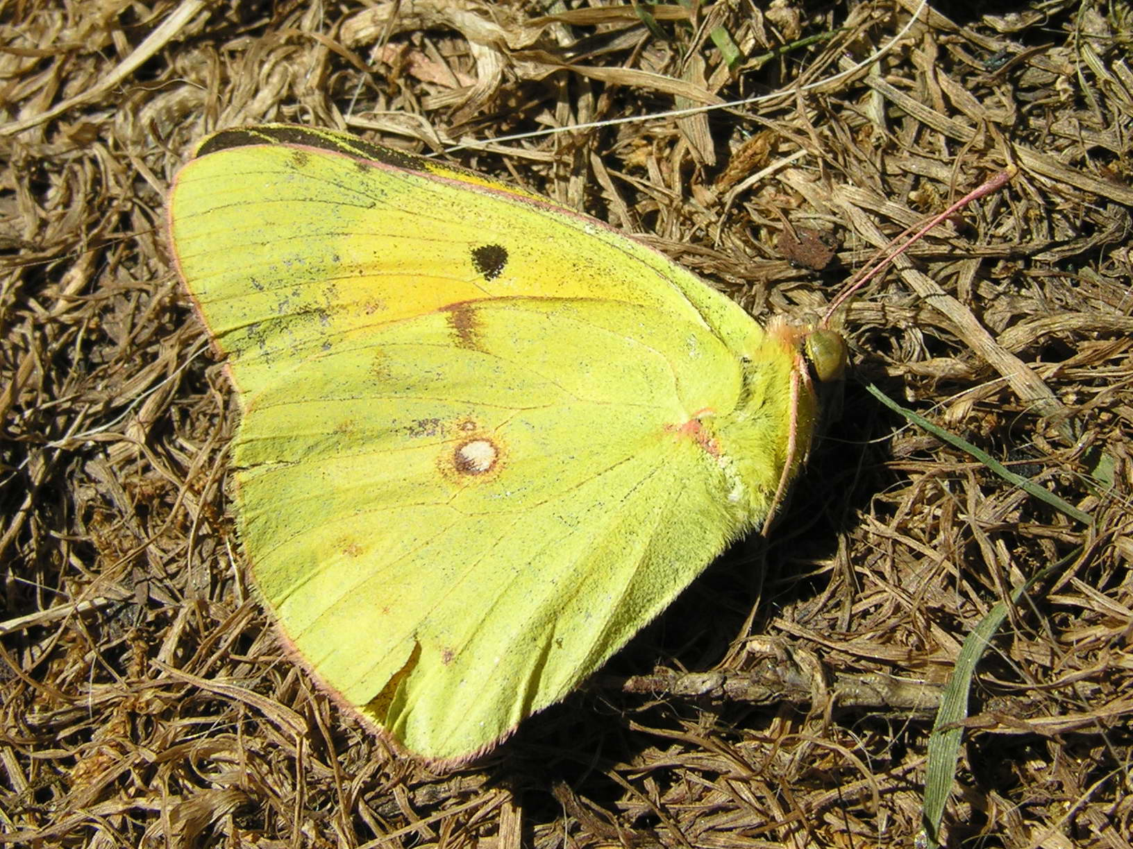 Bolboreta. Bastavales, Brión, Galiza Publish by= Luis Miguel Bugallo Sánchez.